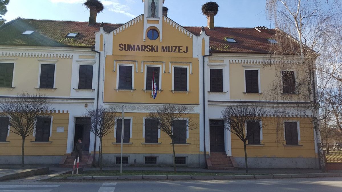 Šumarski muzej Bošnjaci